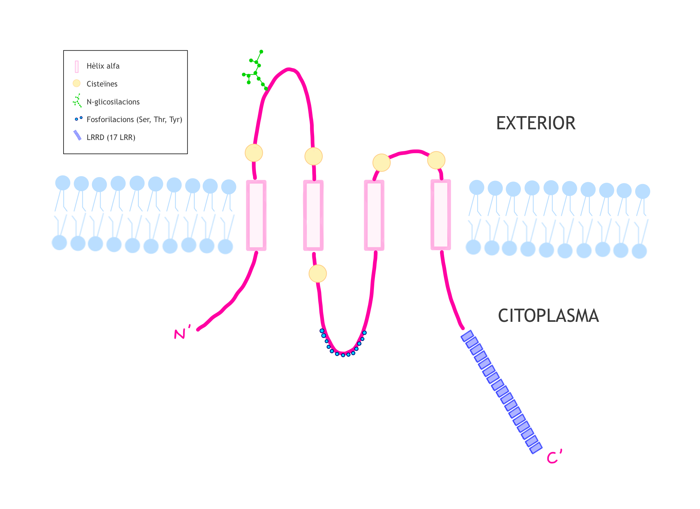 Diagrama sobre la estructura de la proteina LRRC8A en la membrana plasmàtica de una cèl·lula humana